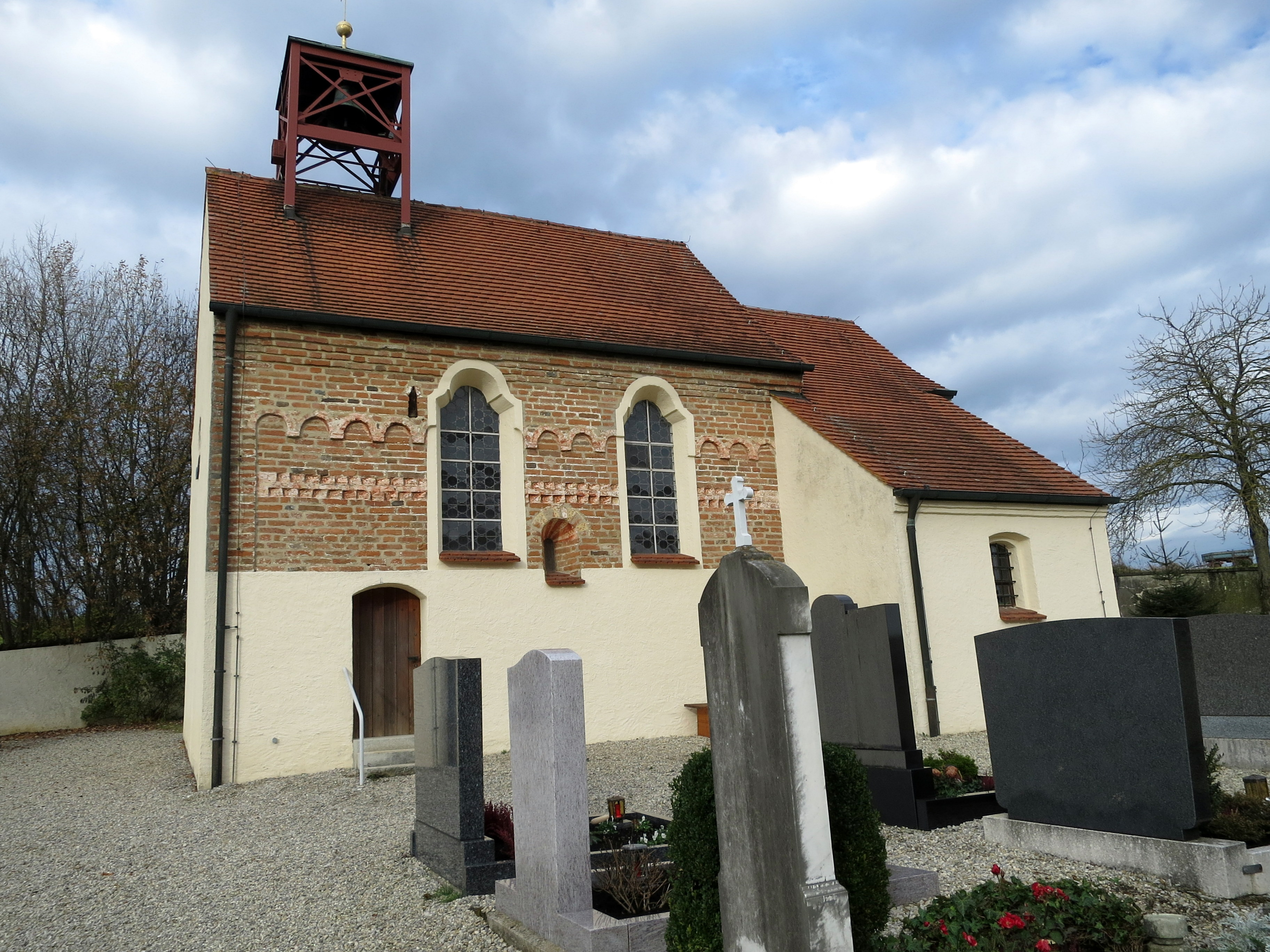 Kirche mit neuem Dachreiter